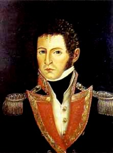 Casa Museo 20 de Julio, Bogotá